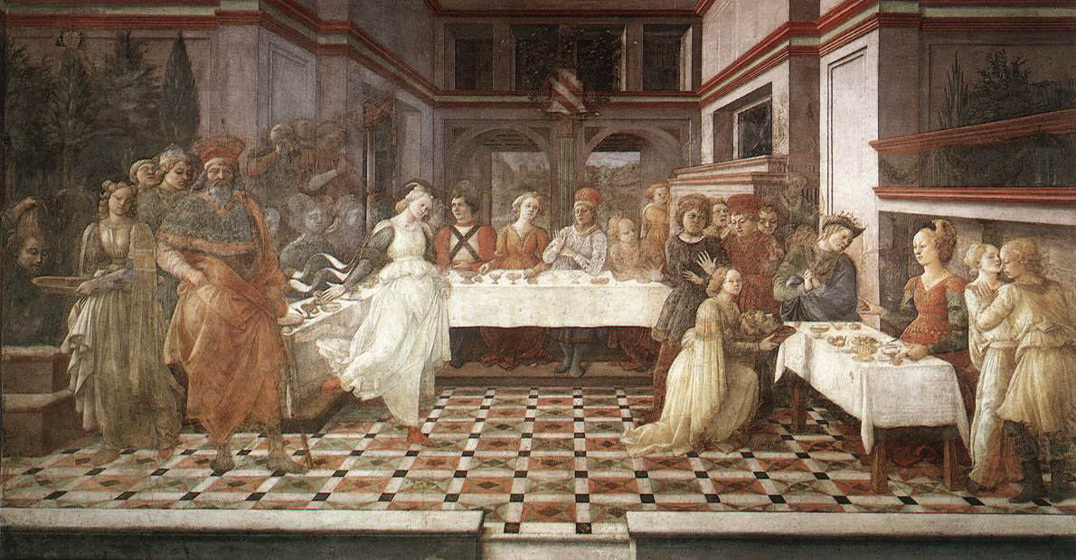 LIPPI, Fra Filippo Herod's Banquet Fresco Duomo, Prato